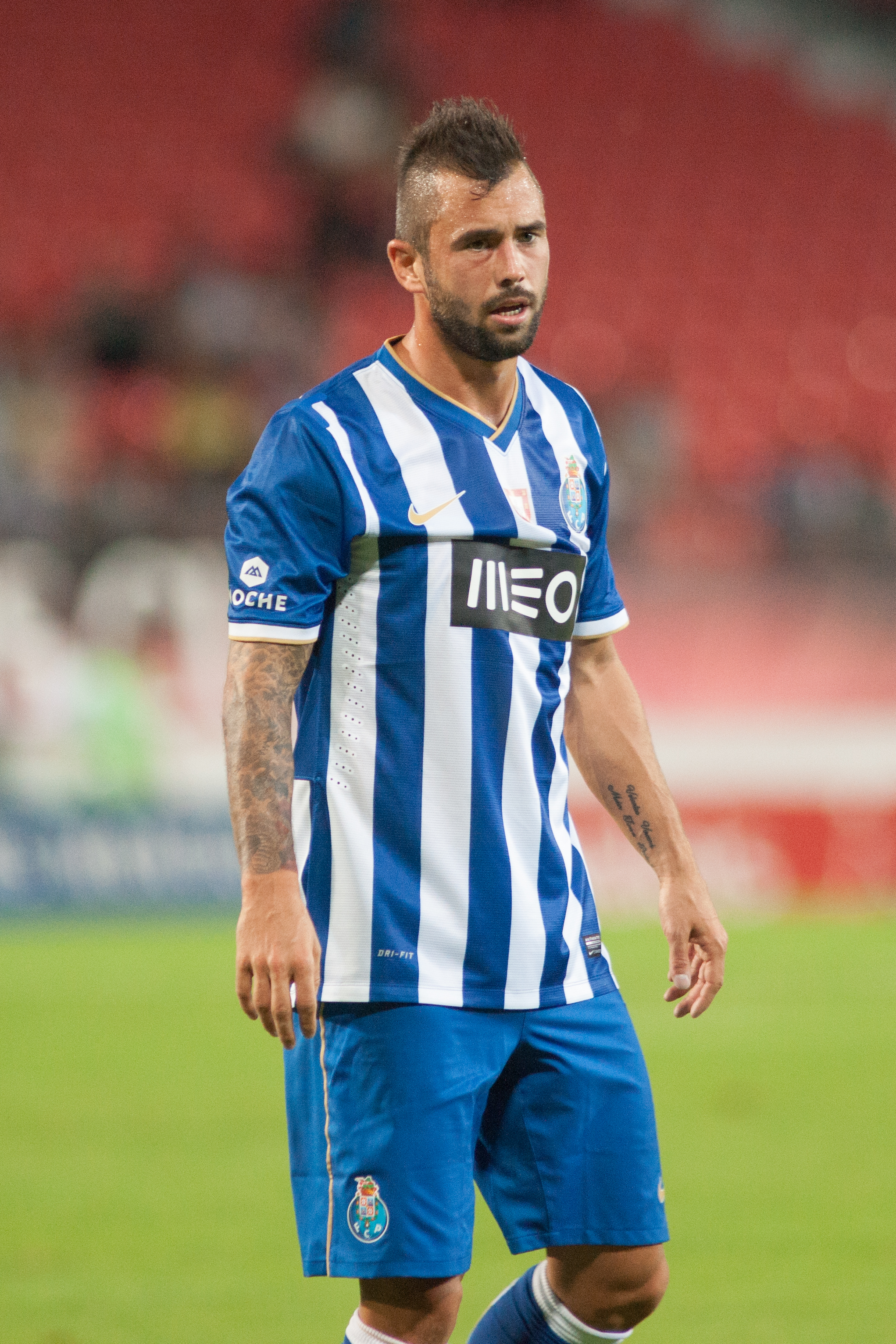 OM - FC Porto - Valais Cup 2013 - Steven Defour